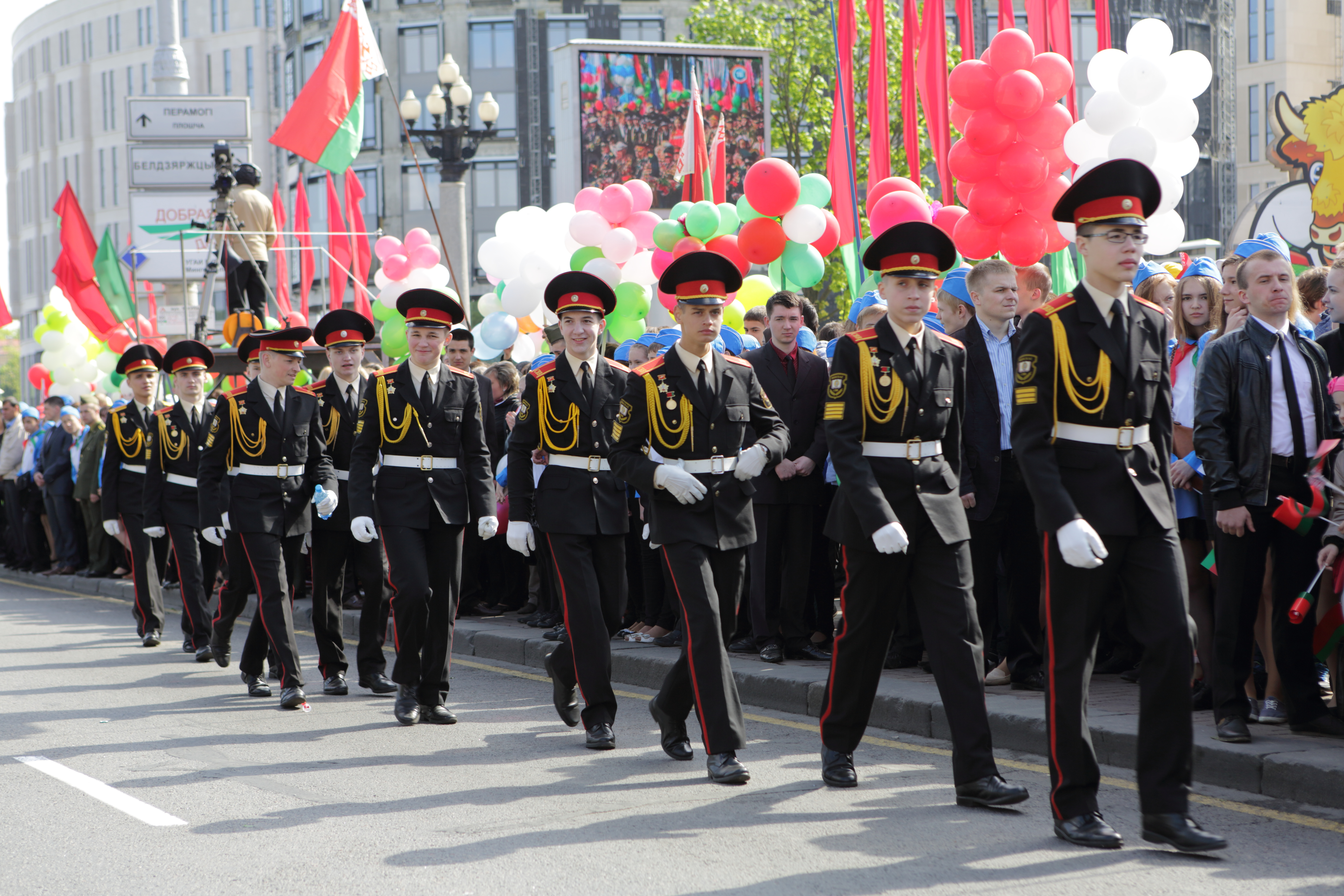 Vojáci, oslavující Den vítězství